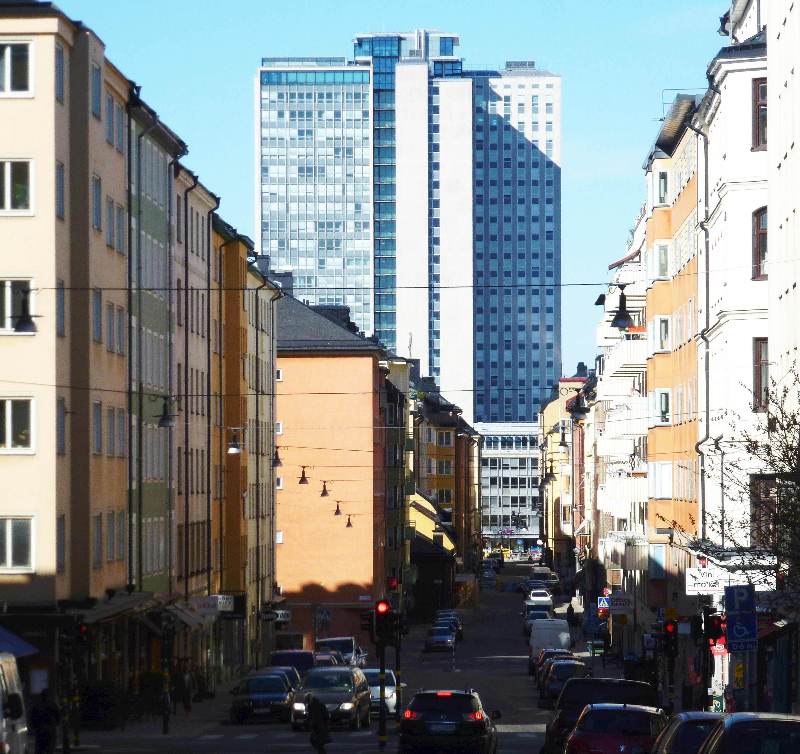 Skatteskrapan vy genom Bondegatan